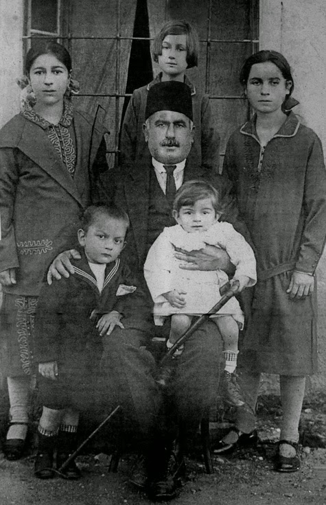 Familja e Hatixhe Dobi, nëna e shkrimtarit Ismail Kadare